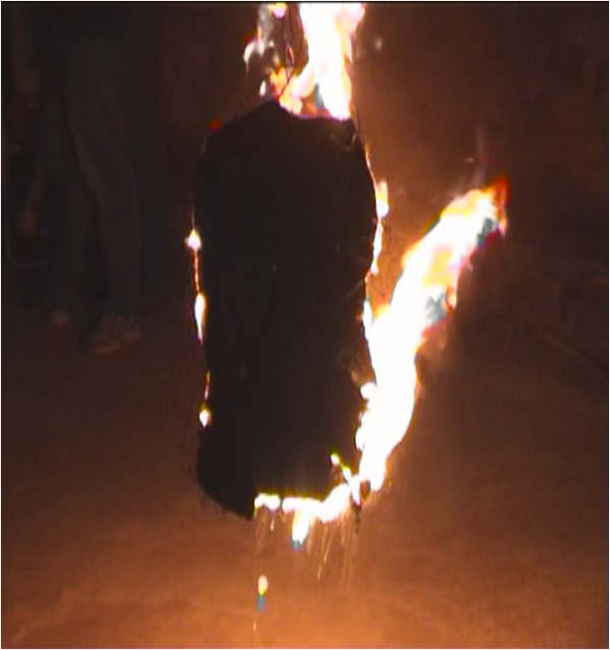 El boto ardiendo ante San Roque en la edición de 2006.